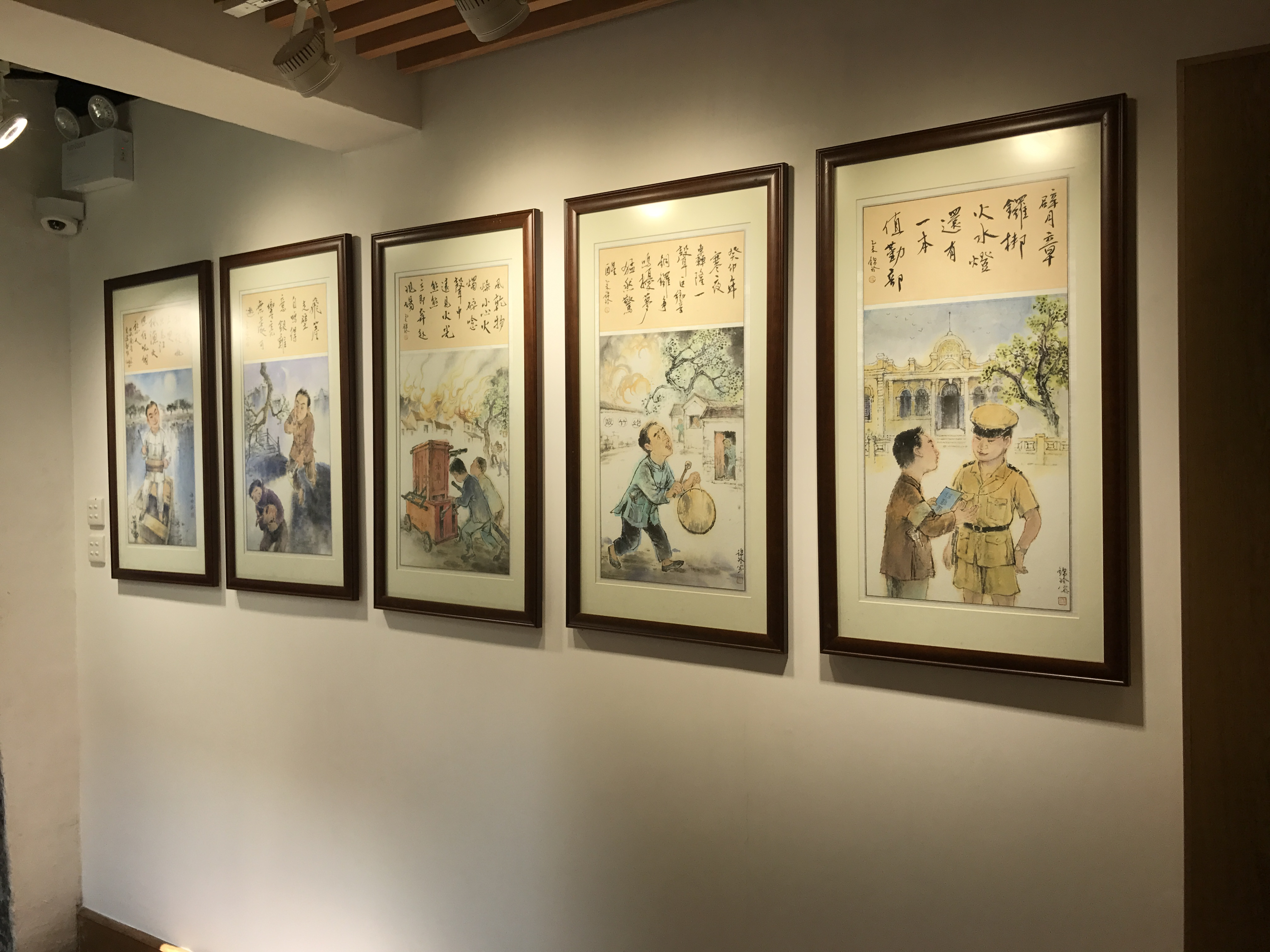 中文（台灣）: 澳門畫家潘錦玲創作的多幅更夫形象圖畫。